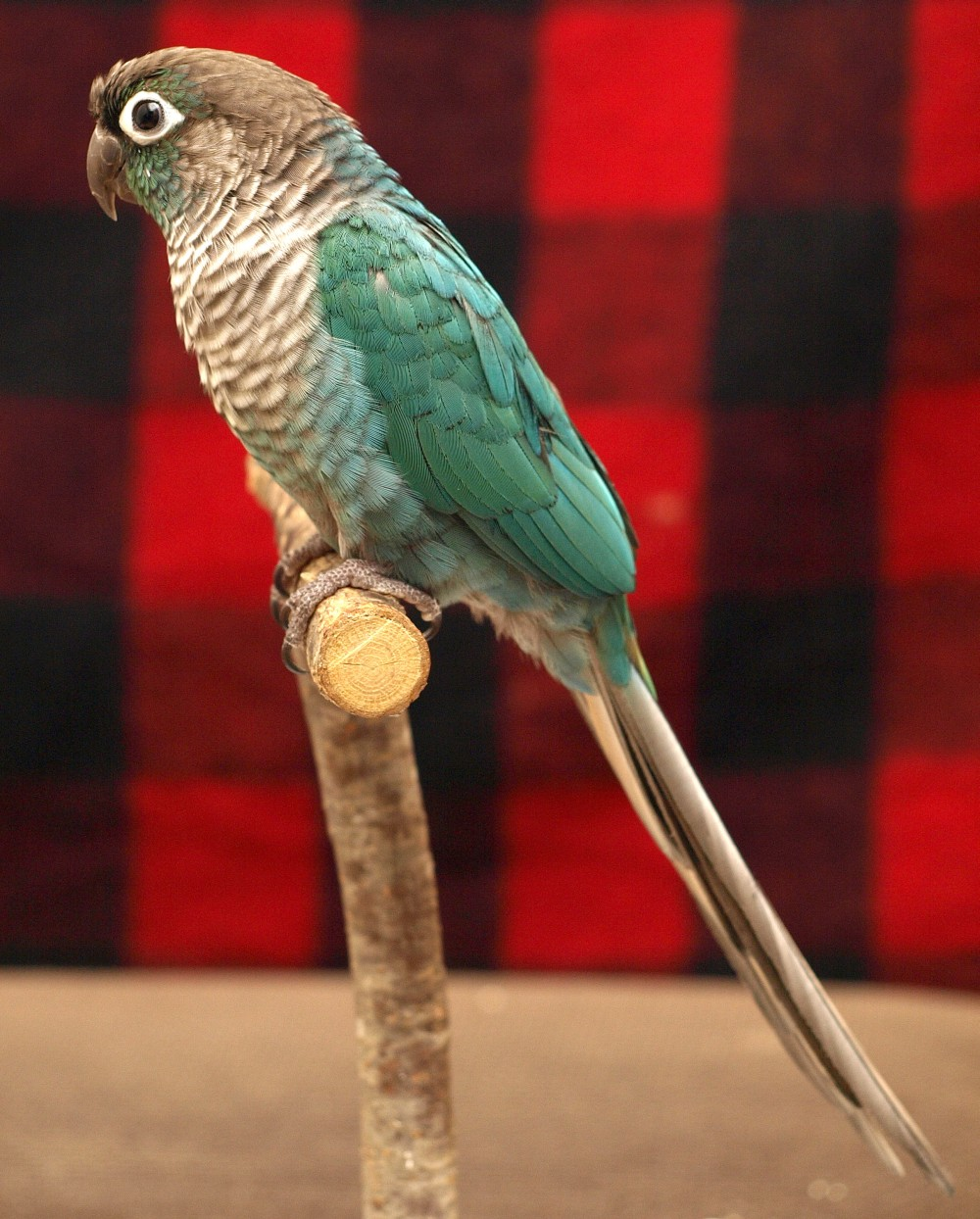 Green-cheeked Conure ホオミドリウロコインコ（変色種：ターコイズ） 投稿者の撮影：Toumoto / 飼主：くら